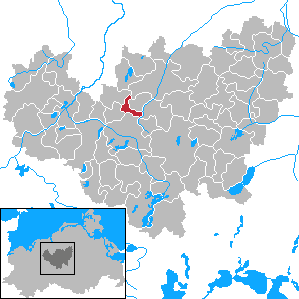 Sarmstorf in Mecklenburg-Vorpommern - District Güstrow